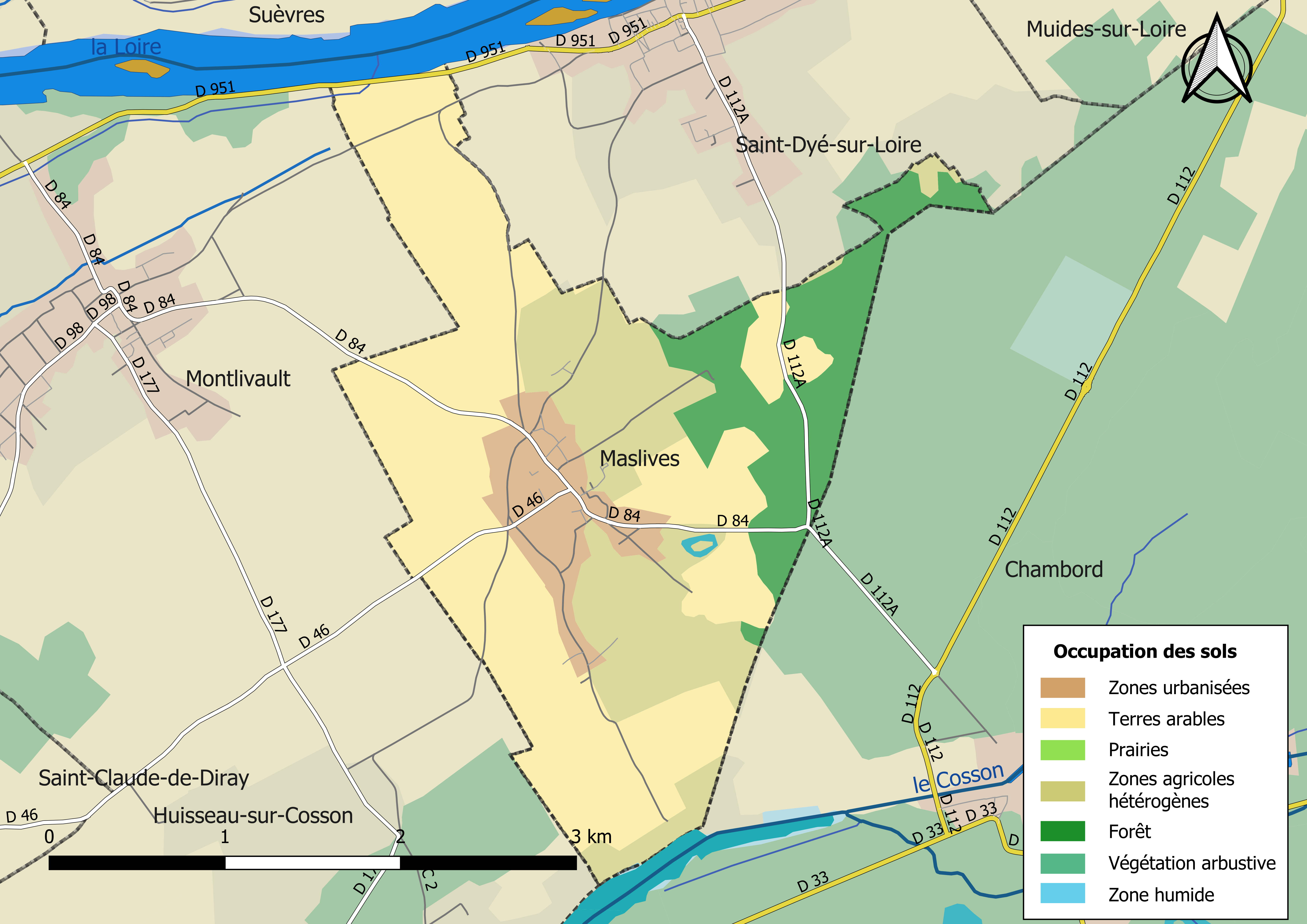 Carte des infrastructures et de l’occupation des sols en 2018 de la commune de Maslives (France).